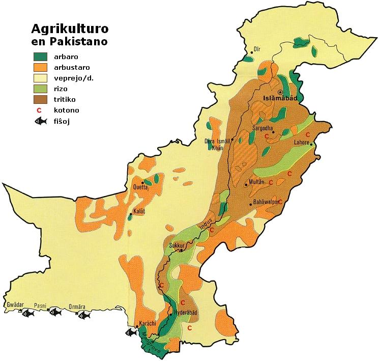 Agrikulturo kaj grunduzo en Pakistano 1973, priskribo: eo